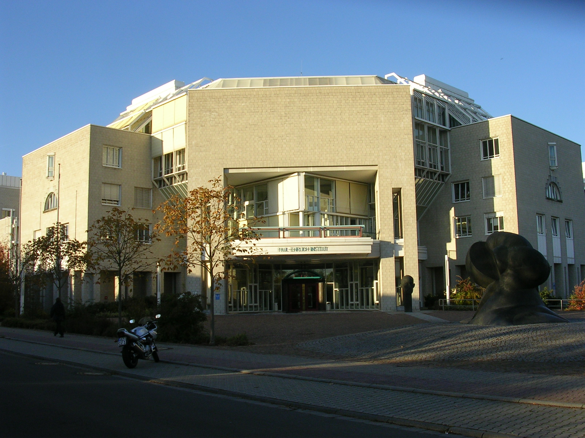 Paul-Ehrlich-Institut in Langen, Germany, Oktober 2006